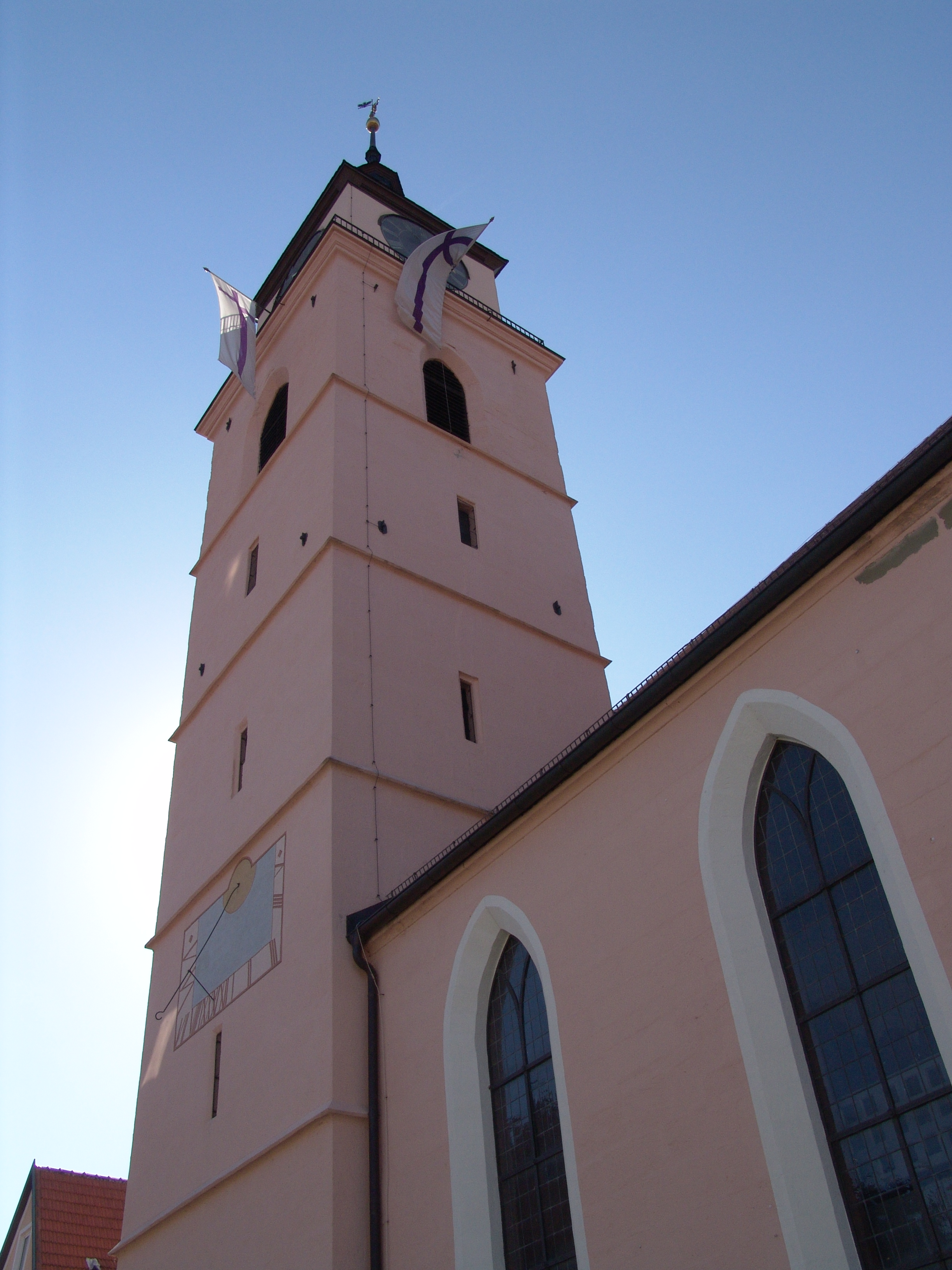 evang.-luth. Kirche Stadtkirche St. Johannes der Täufer in Neustadt an der Aisch